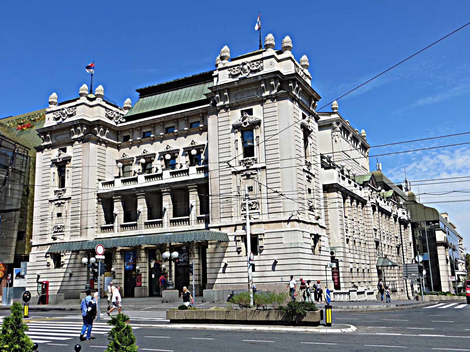 Narodno pozorište